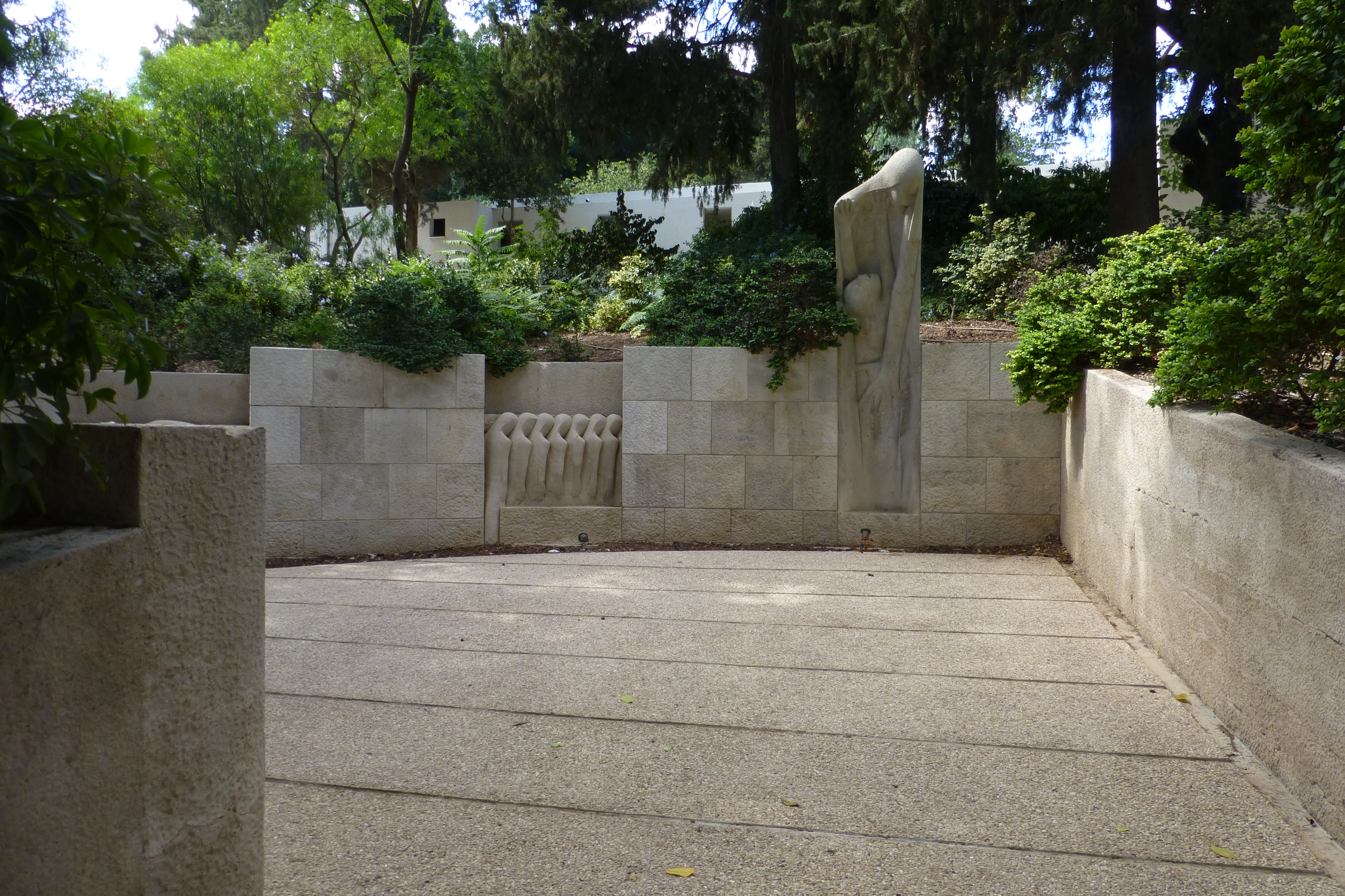 "יד לילדי הגולה" היא אנדרטת זיכרון לשואה הנמצאת במרכז קיבוץ משמר העמק, בתוך גן הנקרא פינת הגולה. האנדרטה נוצרה על ידי הפסל הישראלי זאב בן צבי והיא מוקדשת ללוחמת במרד גטו ורשה, טוסיה אלטמן ומתרכזת בשואת מליון וחצי הילדים שהושמדו.